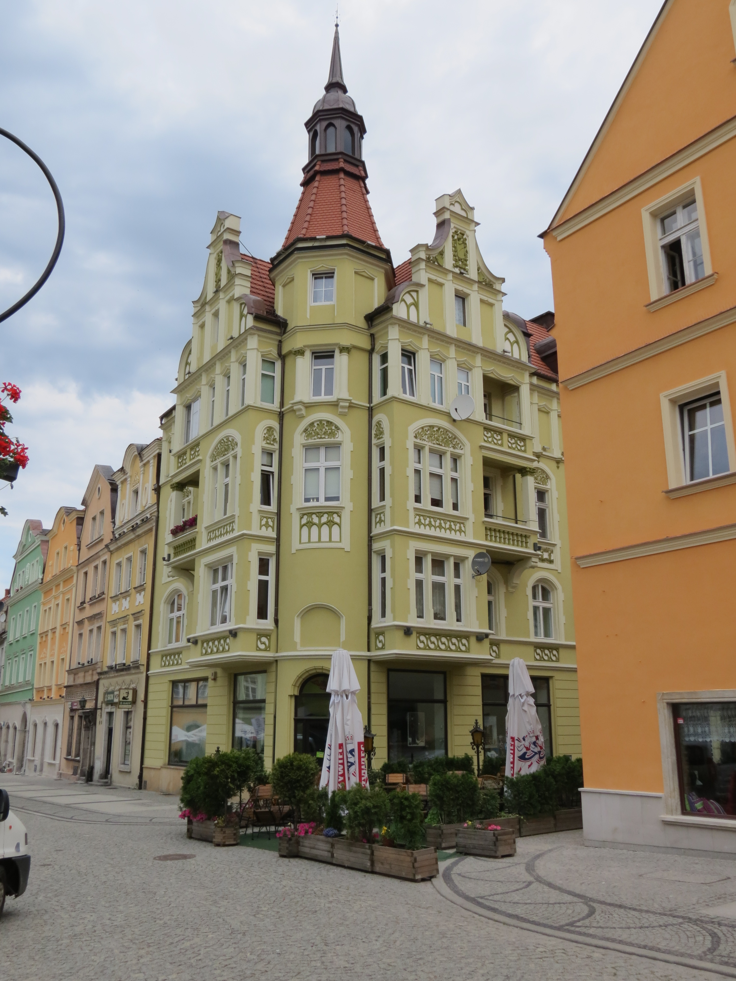 Bolesławiec, kamienica, 1900